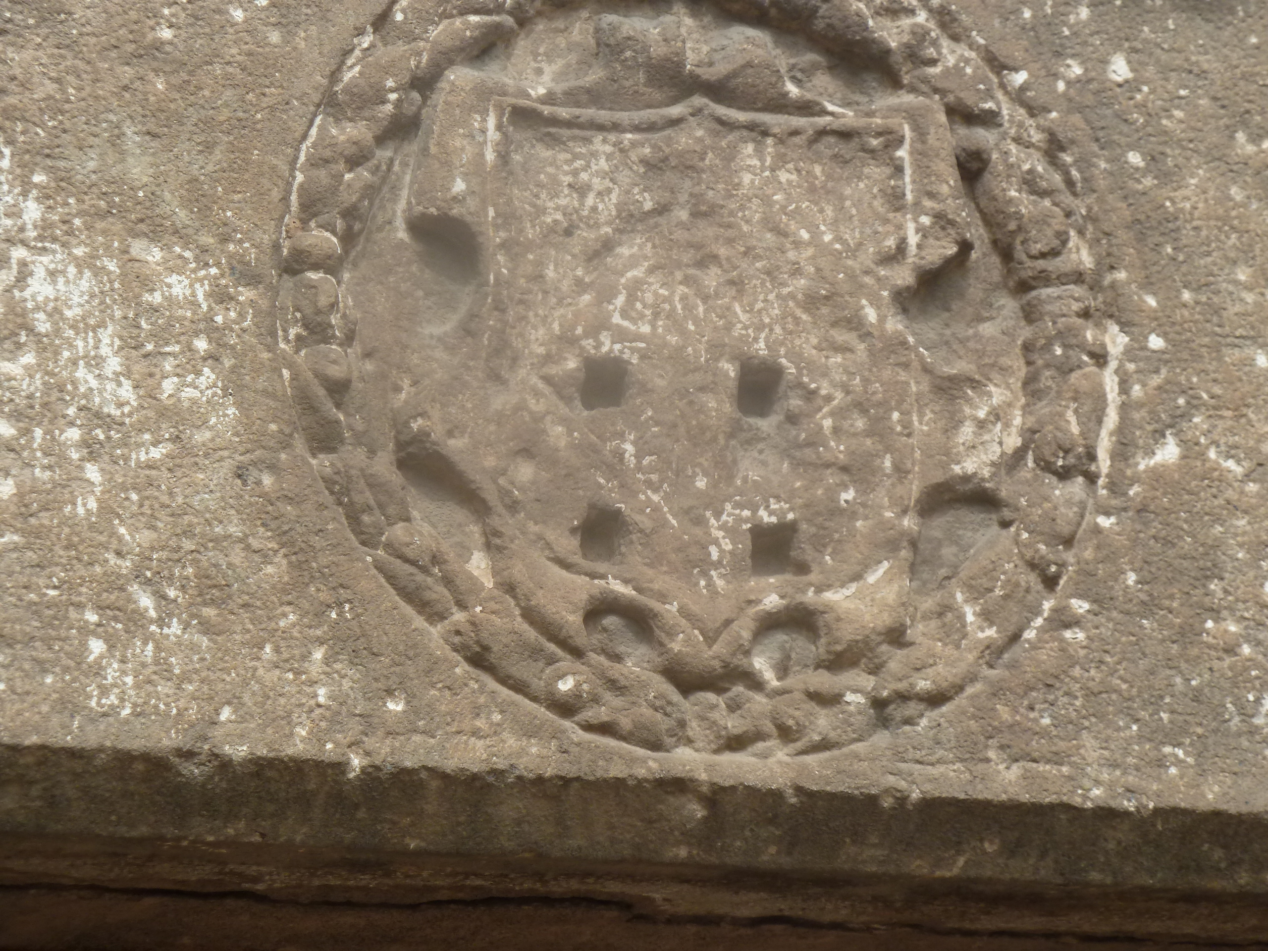 Palau dels Requesens (Molins de Rei). Escut situat a Can Mateu. Guarnia l'entrada al jardí del Palau.